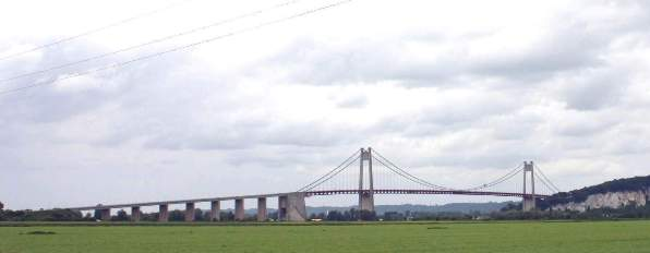 Bréck vun Tancarville vum lenksen Uwänner gesinn.